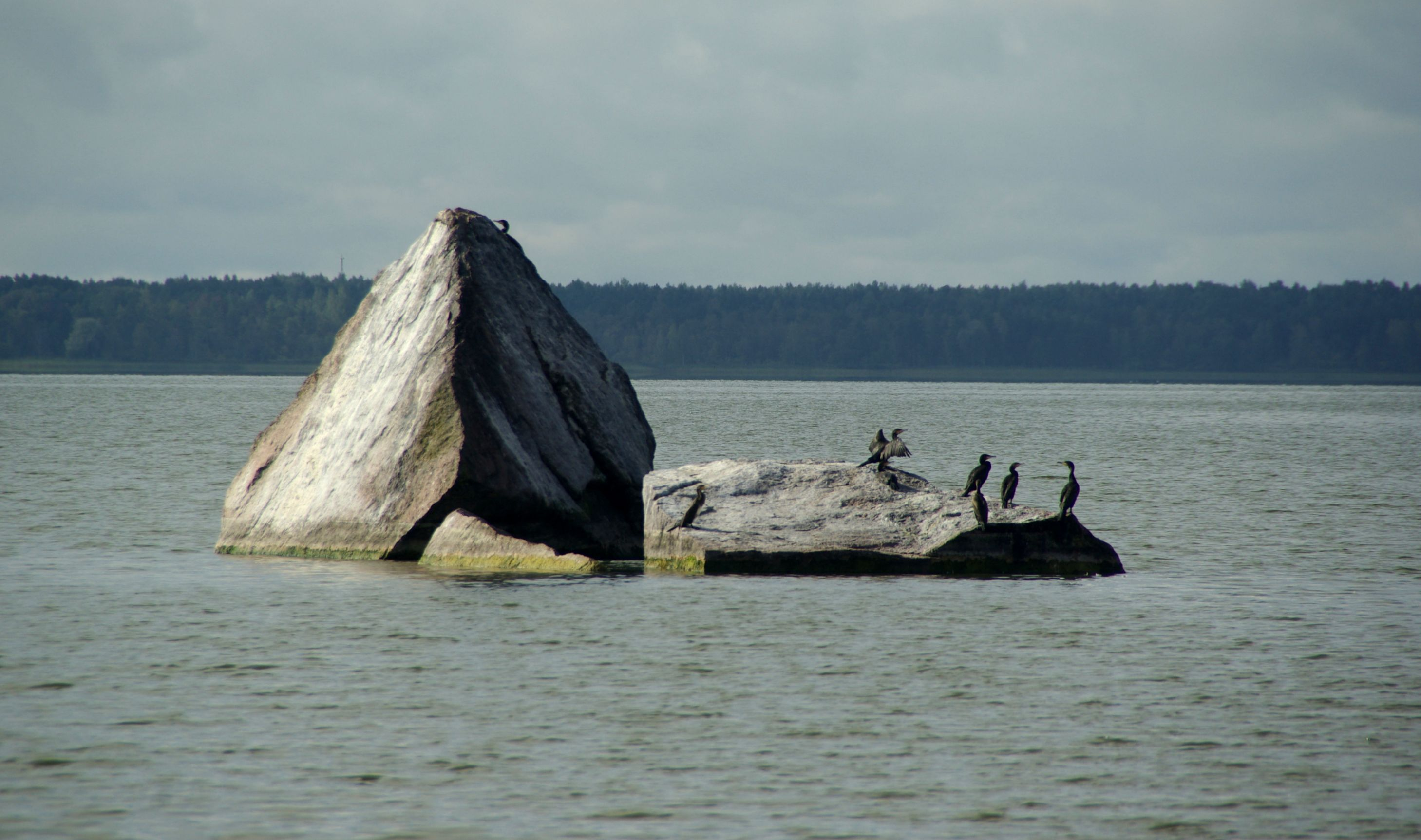 Kivi Ülemiste järves.